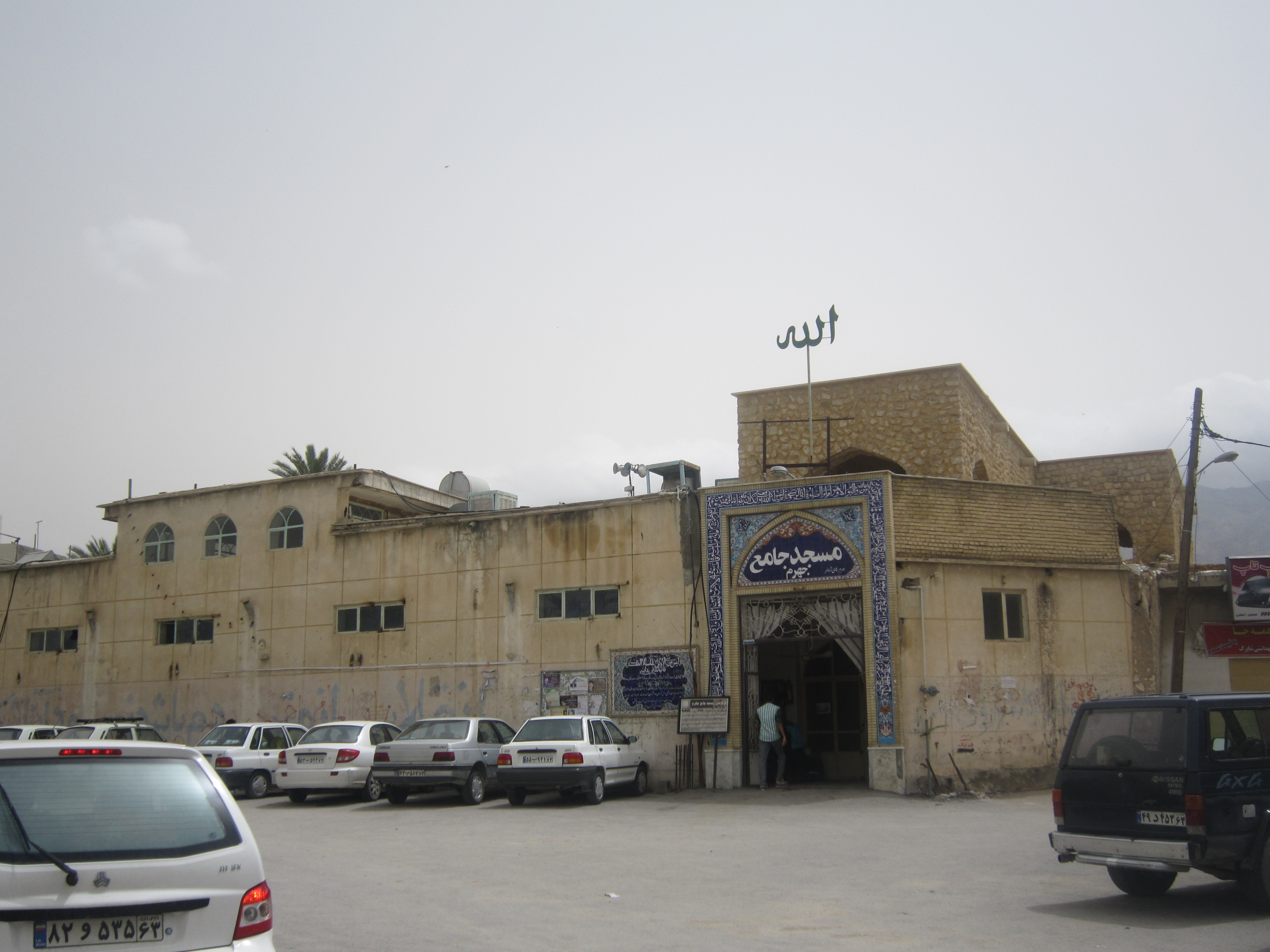 مسجد جامع جهرم فارس